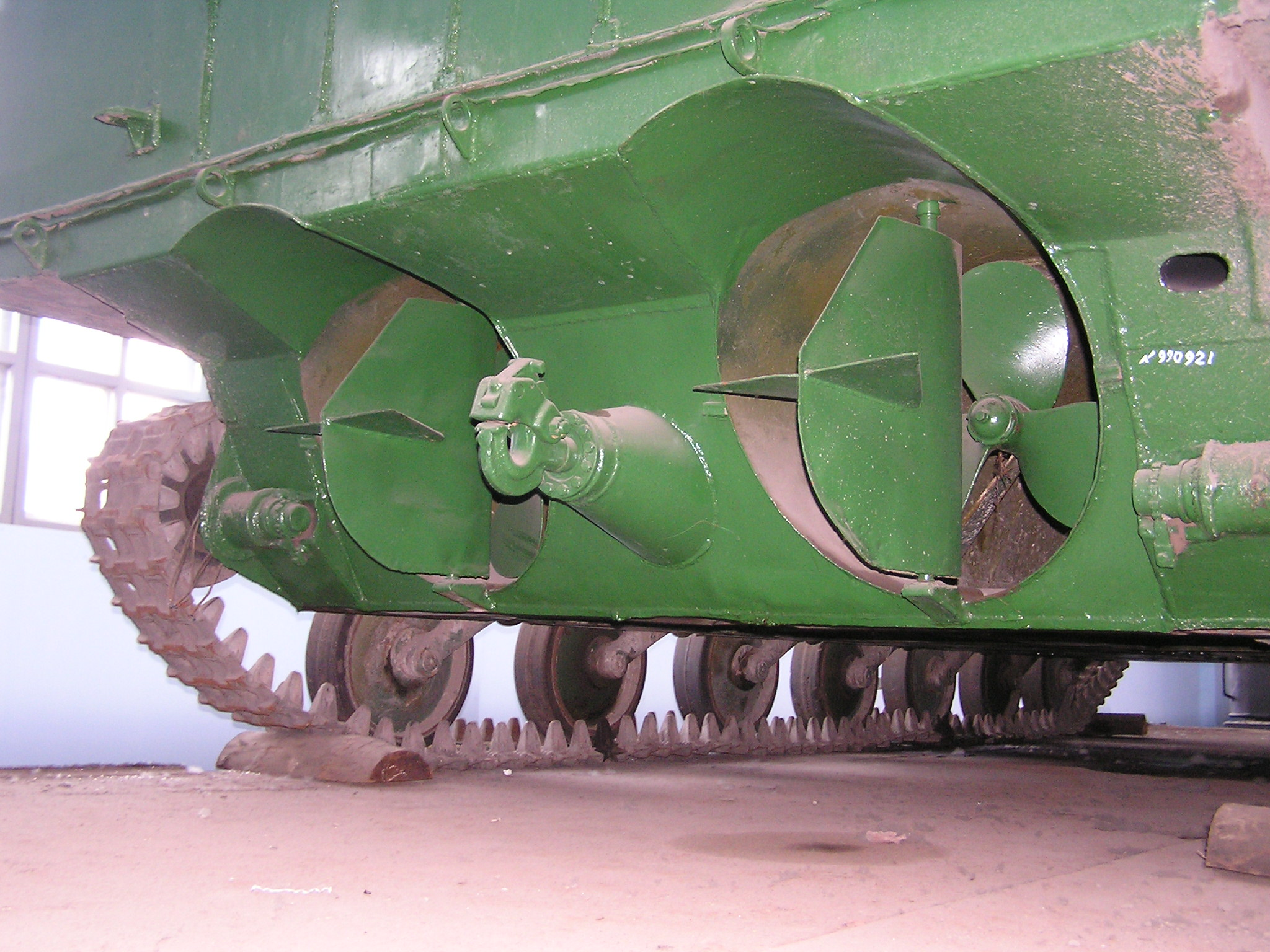 Музей истории и развития Донецкой Железной дороги. Амфибия